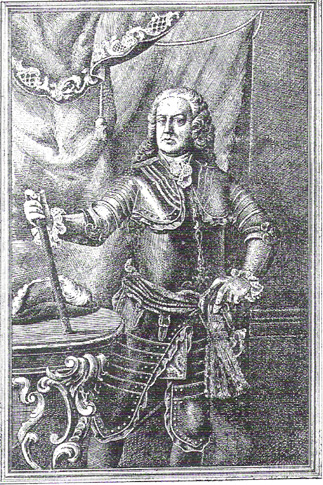 Antoni de Villarroel; gravat publicat per Josep Rafael Carreras i Bulbena el 1905 a l'obra "Villarroel, Casanova, Dalmau"; el gravat original és a la col·lecció Carreras Bulbena a l'Arxiu Històric de Catalunya, a Sant Cugat, junt amb l'expedient militar de Villarroel procedent de l'Arxiu de la Guerra Kriegsarchiv de Viena